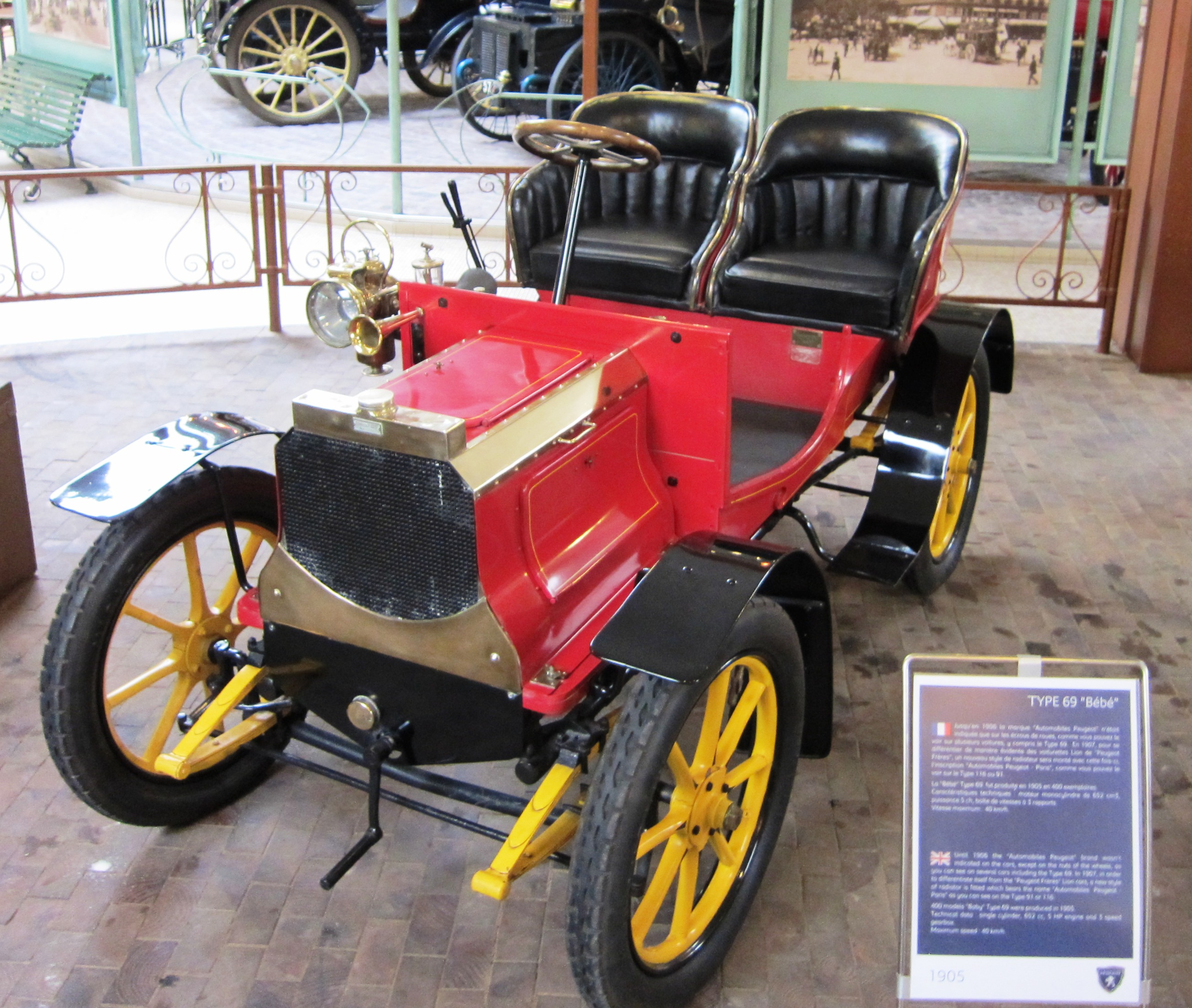 Peugeot Type 69 Bébé